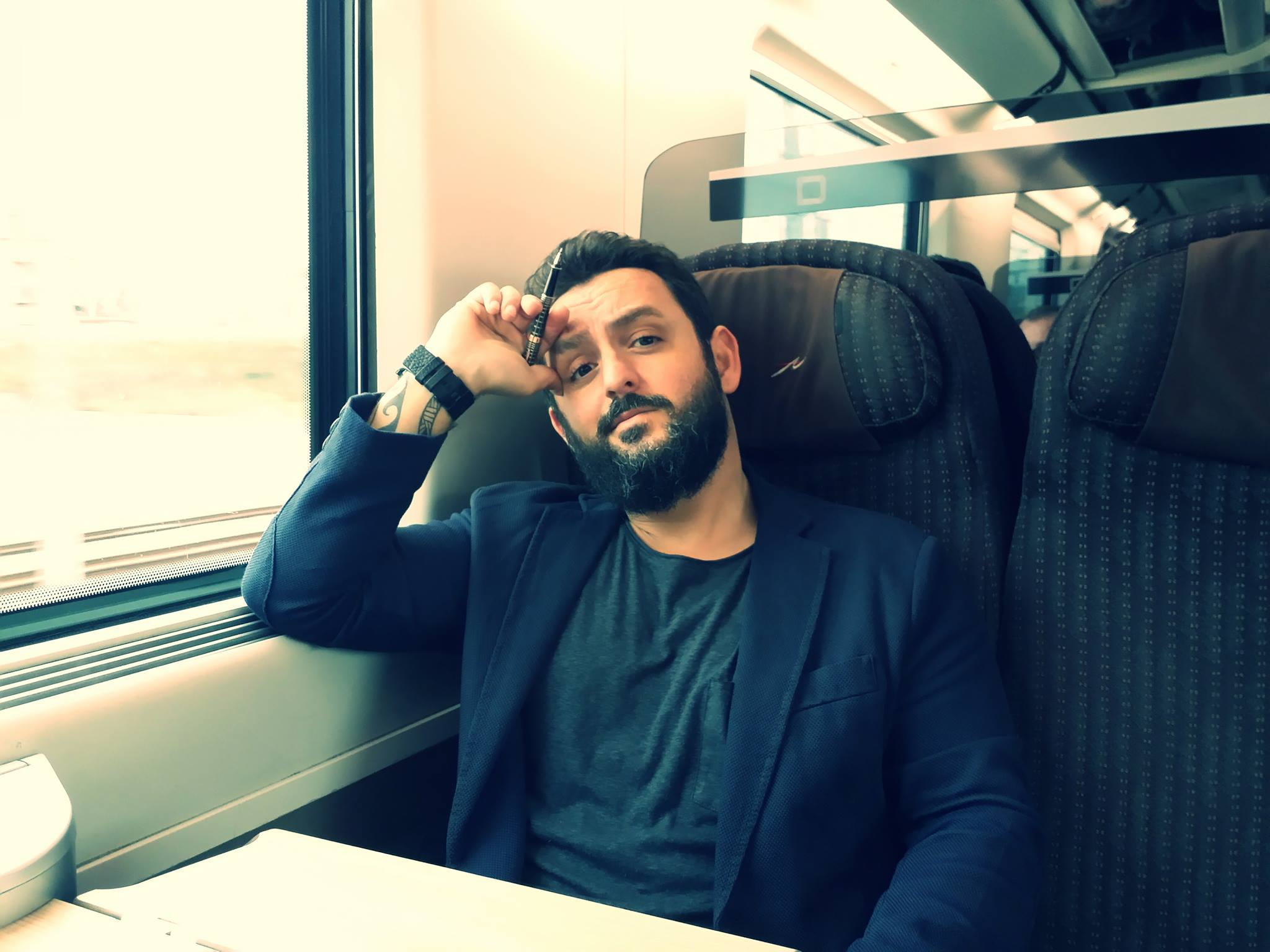 Foto di Stefano Piedimonte